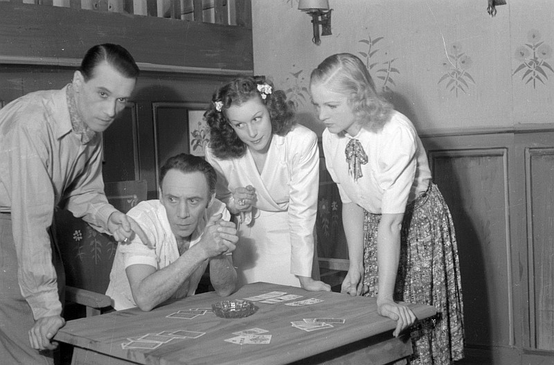 Original image description from the Deutsche Fotothek Szenenbilder mit Rudolf Platte